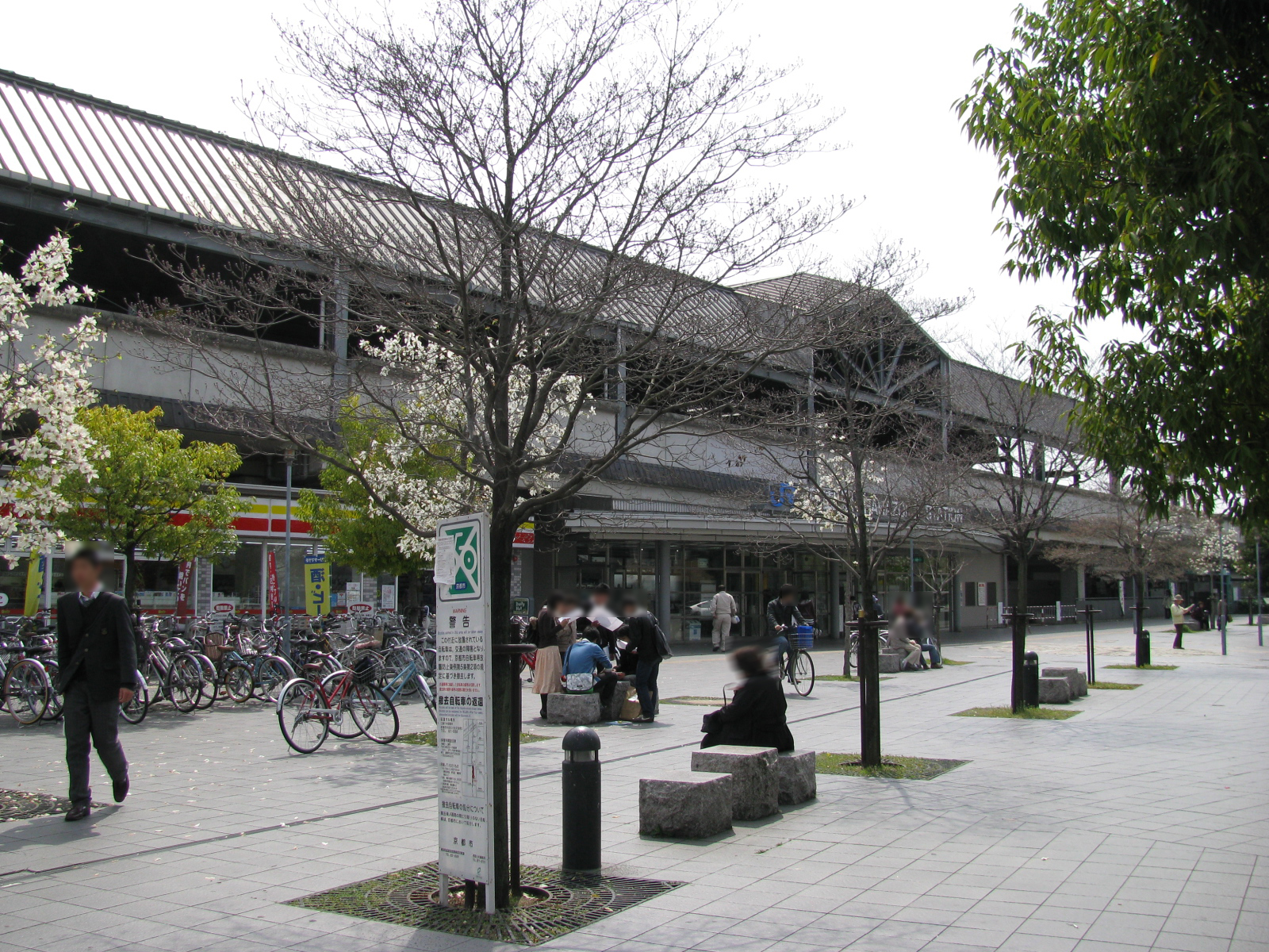 山陰本線花園駅